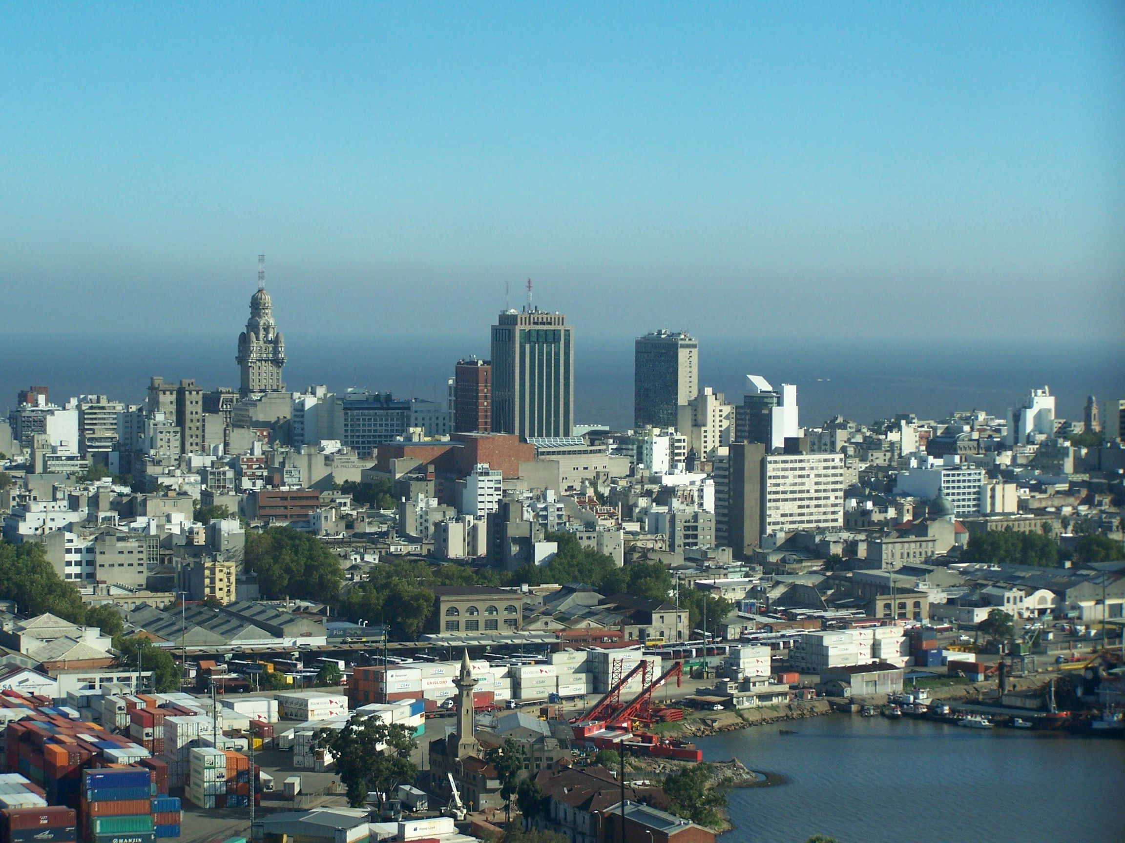 El centro y la ciudad vieja de Montevideo, visto de la torre de Antel.